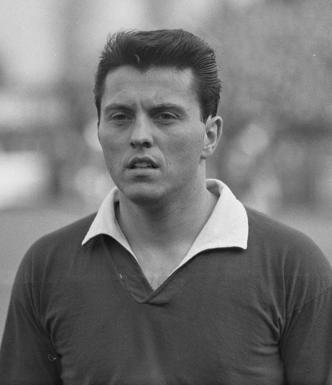 Ger Donners.